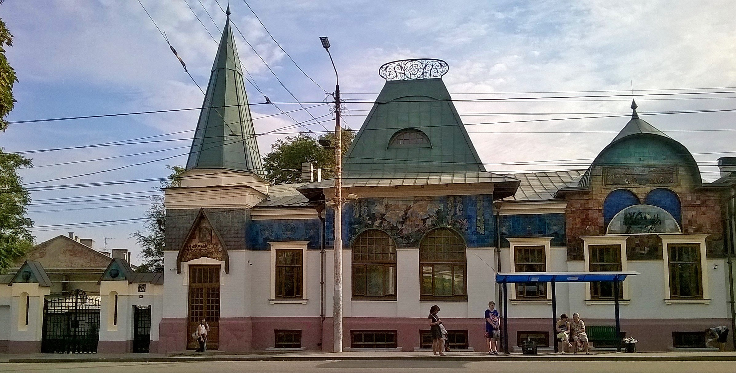 Дом Шаронова после реставрации 2018-2019 года: улица Фрунзе, 80, Таганрог, Ростовская область